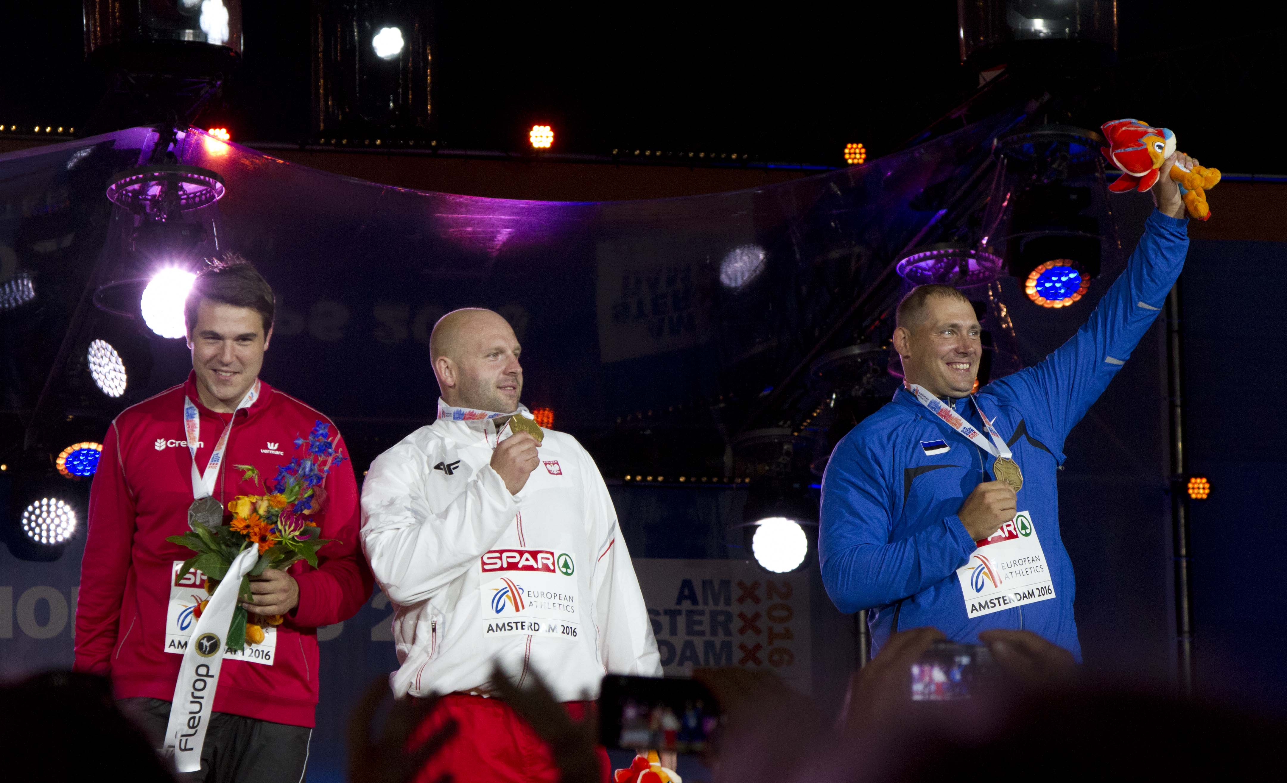 673 podium discus